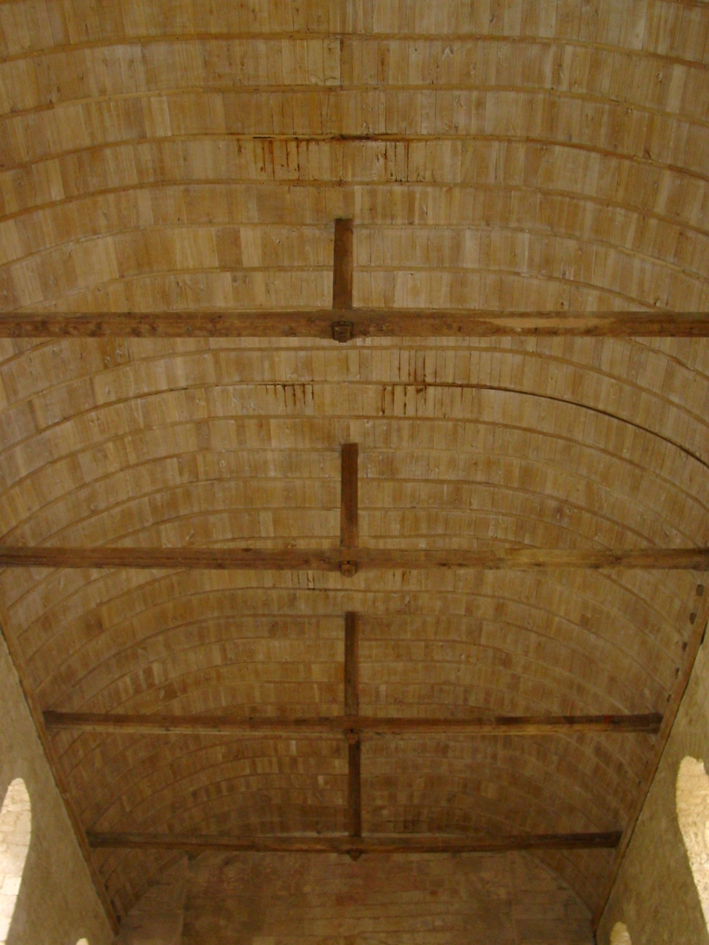 La charpente en coque de bateau de l'église Saint-Savinien de Melle, Deux-Sèvres, France